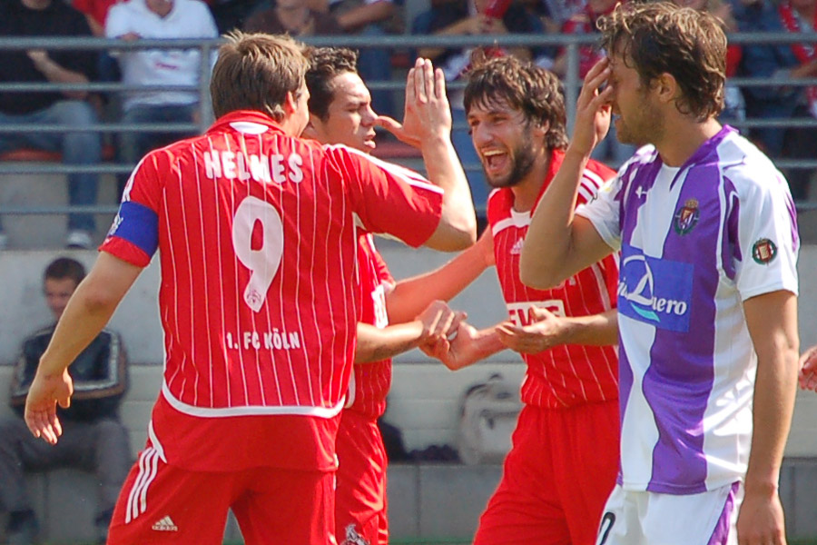 FC vs. Real